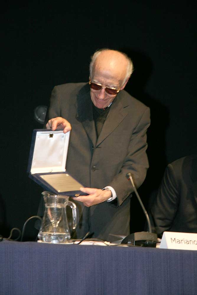 Reconocimiento al Rector emérito de la UM, Mariano Brito